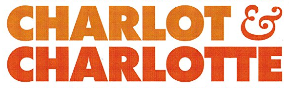 Titeltext för TV-serien Charlot & Charlotte, hämtad från DVD-boxens framsida.